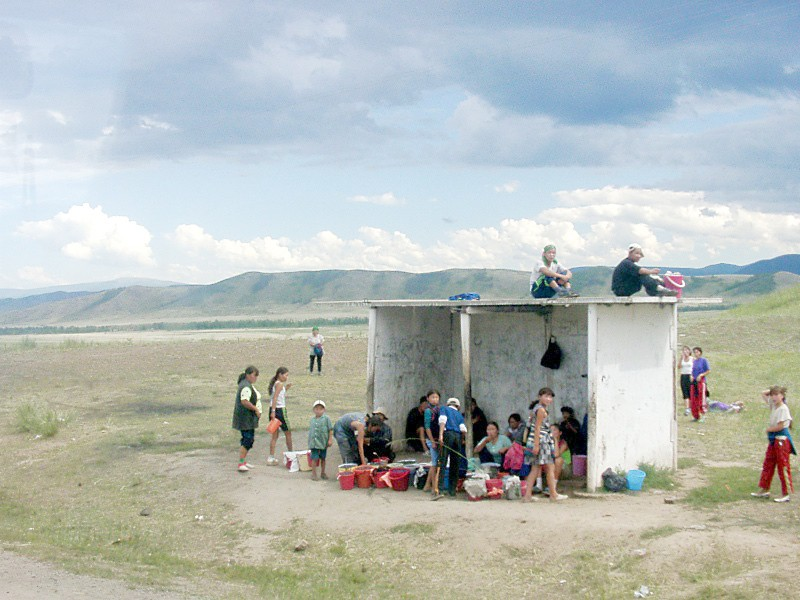 Menschen an einer Bushaltestelle in der tuvinischen Steppe zwischen Shagonar (51°34'N - 93°01'E) und Kyzyl (51°42'N - 94°23'E)